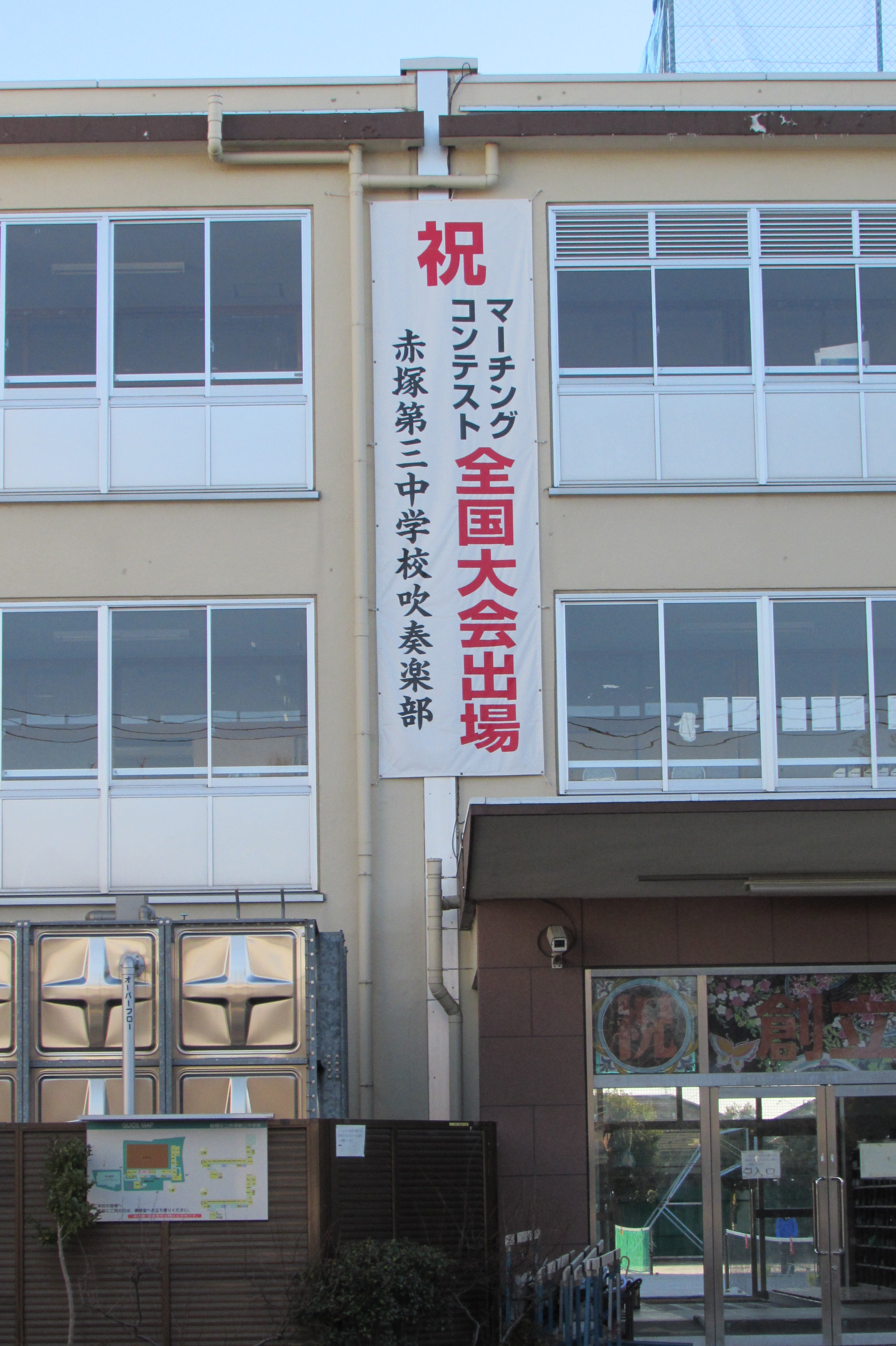 正門中央に設置された吹奏楽部全国大会出場を告げる垂れ幕。